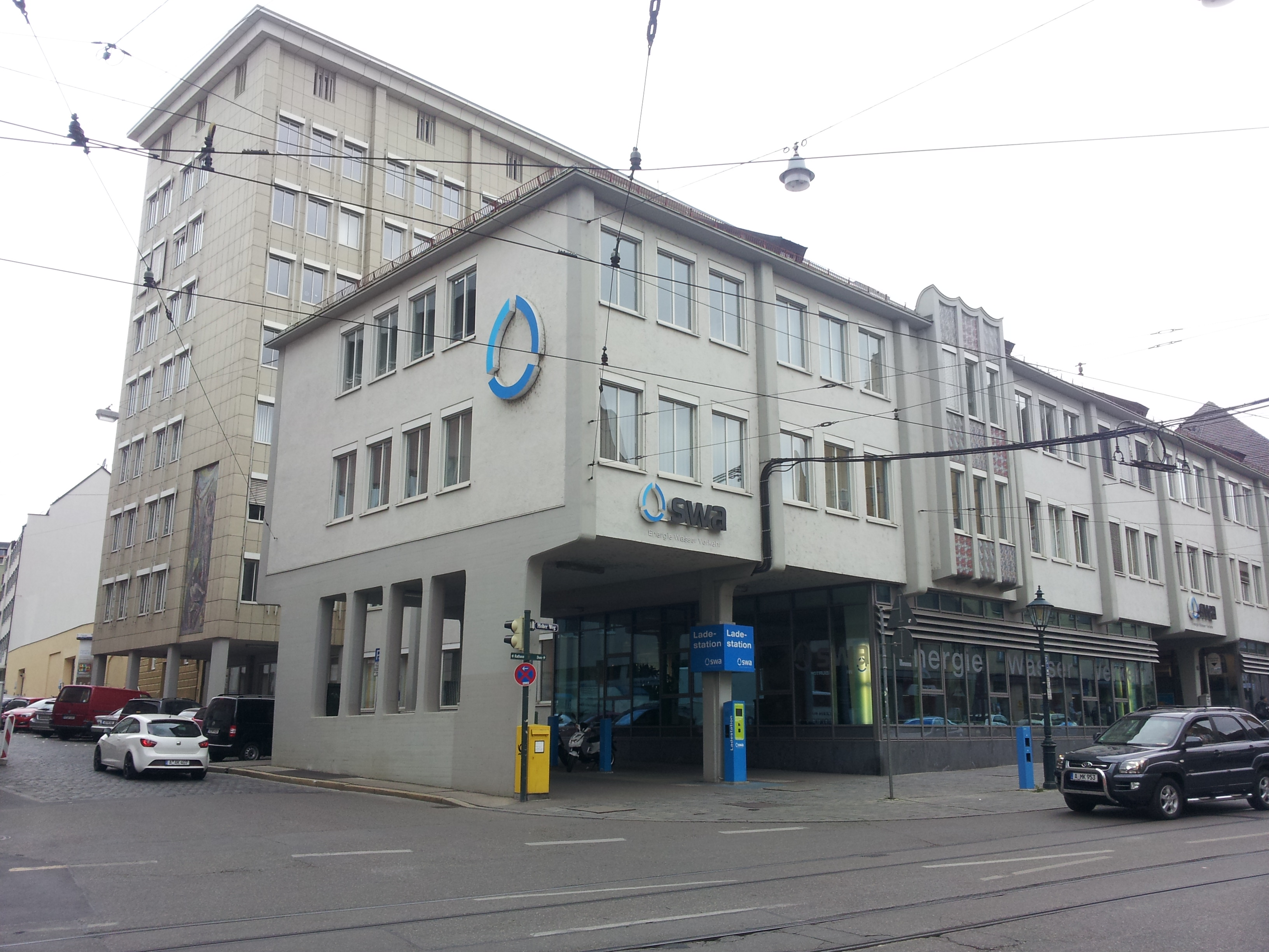 Das SWA Gebäude